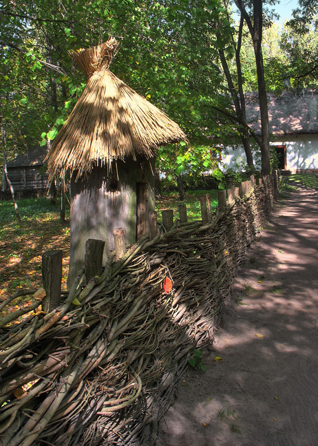 Комплекс музею народної архiтектури та побуту (скансен) в Переяславі-Хмельницькому